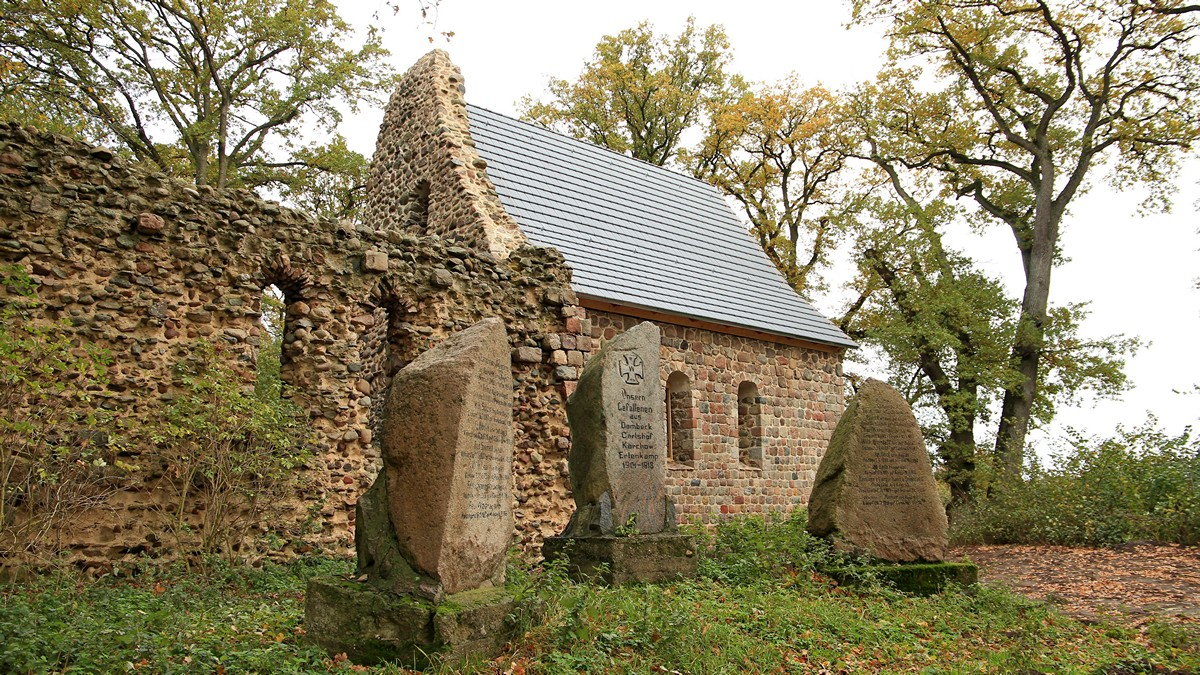 Ostgiebel der restaurierten Kirche in Dambeck (Bütow)